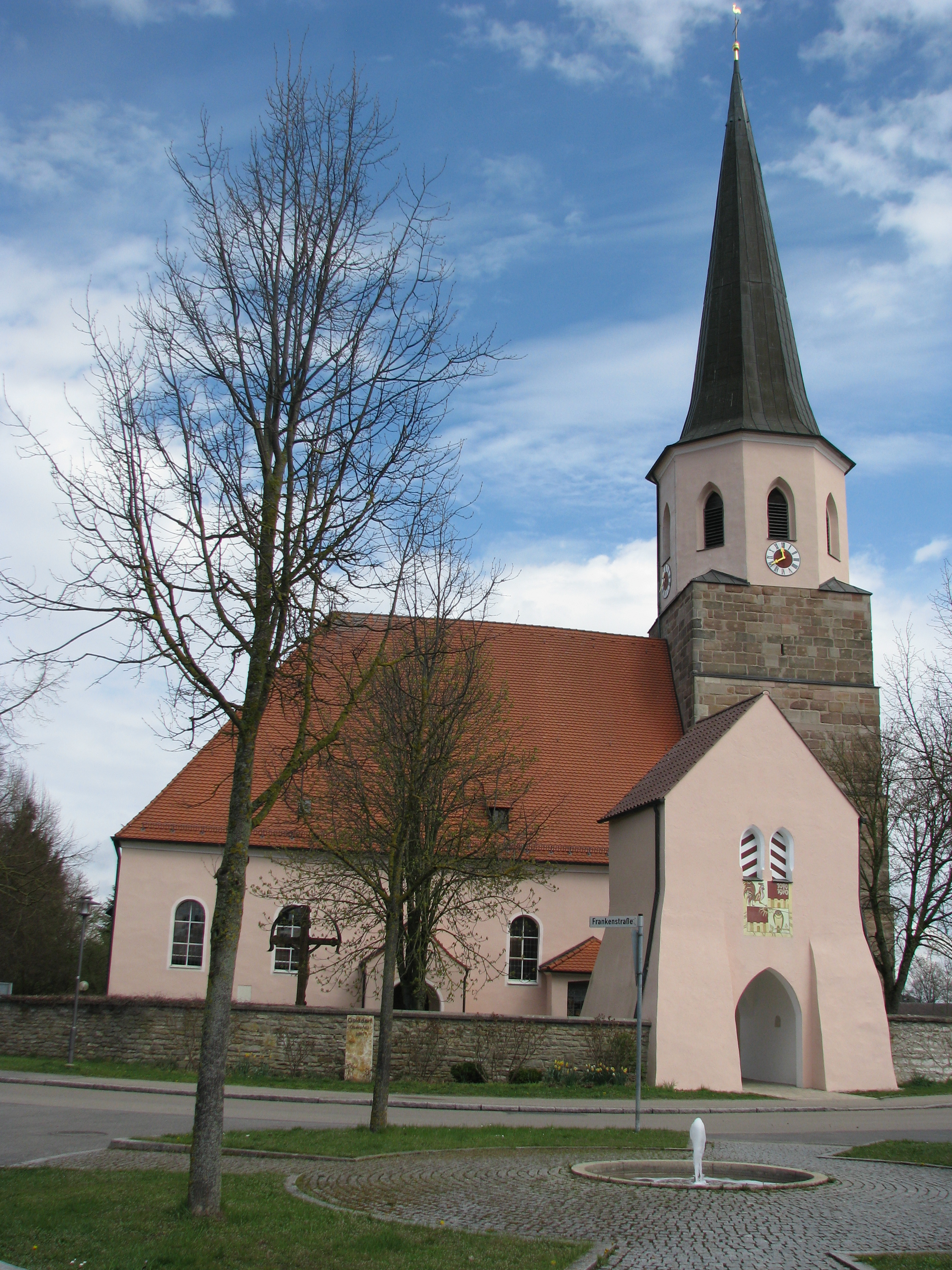 Möning, Ortsteil von Freystadt im Landkreis Neumarkt in der Oberpfalz, Kath. Pfarrkirche St. Willibald